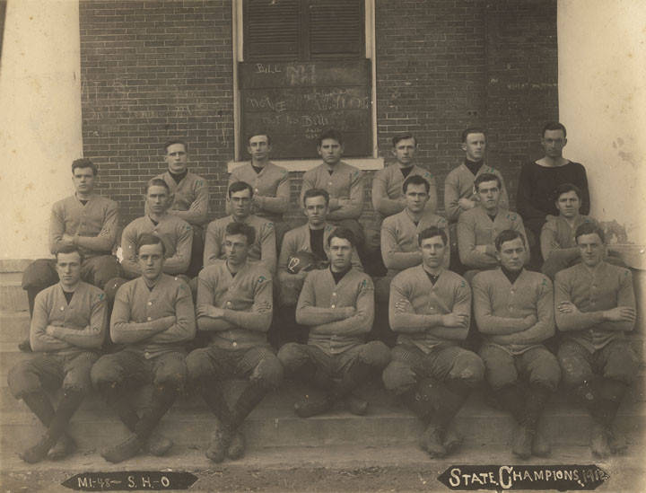 马里昂军事学院美式足球队1912年州冠军阵容